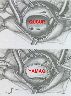 Açıq ürəkdə, süni qan dövranı şəraitində anadangəlmə ürək qüsuru-qulaqcıqlararası çəpərin yamaq vasitəsilə tutulması əməliyyatı